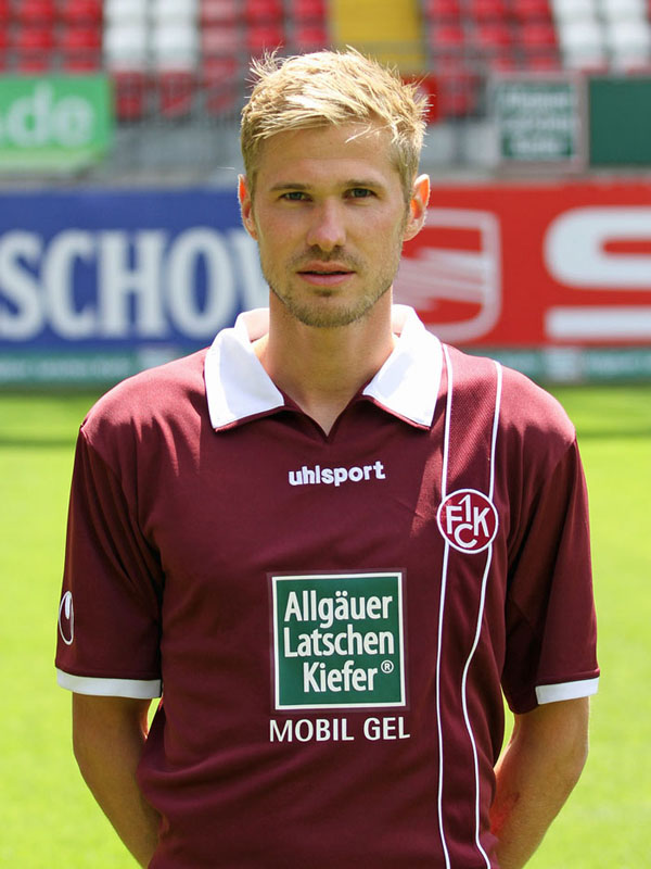 Oliver Kirch, Fußballspieler